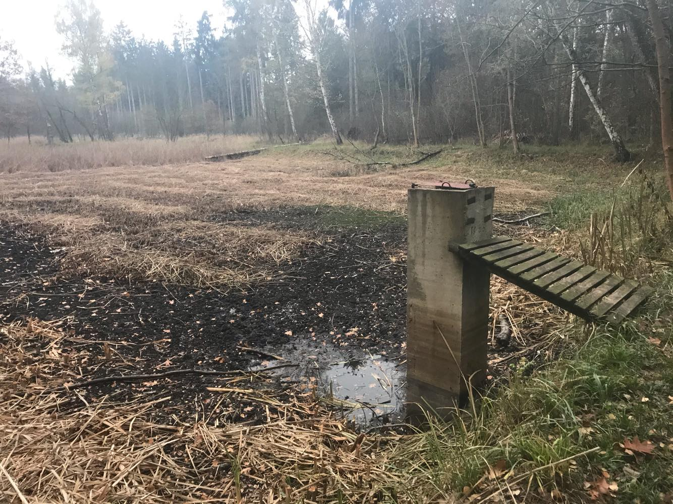 Pohled z popředí